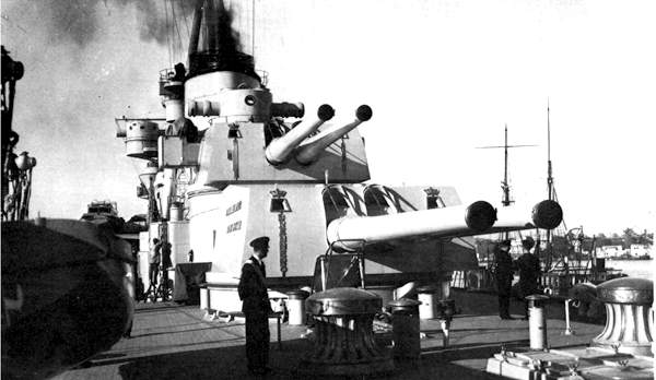 Armement du croiseur Bolzano, croiseur lourd de la Regia Marina (marine militaire italienne) faisant partie de la Classe Trento. Sa construction débuta à Gênes en 1930, Il fut coulé en 1944.